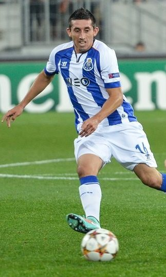 Ектор Еррера під час виступів за ФК Порту